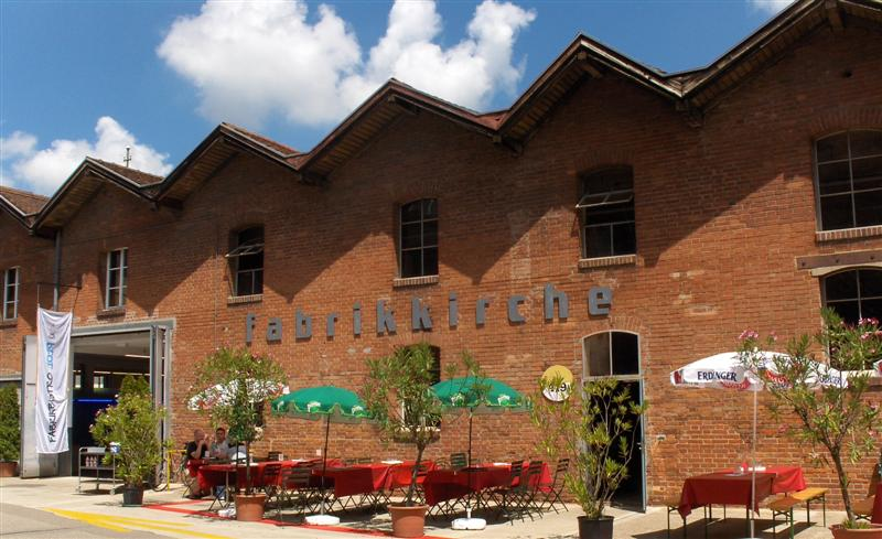 Lokalität der ref. Fabrikkirche Winterthur. Hier finden Gottesdienste und viele weitere Veranstaltungen statt. Am Mittag dient die ehemalige Fabrikhalle als Bistro.